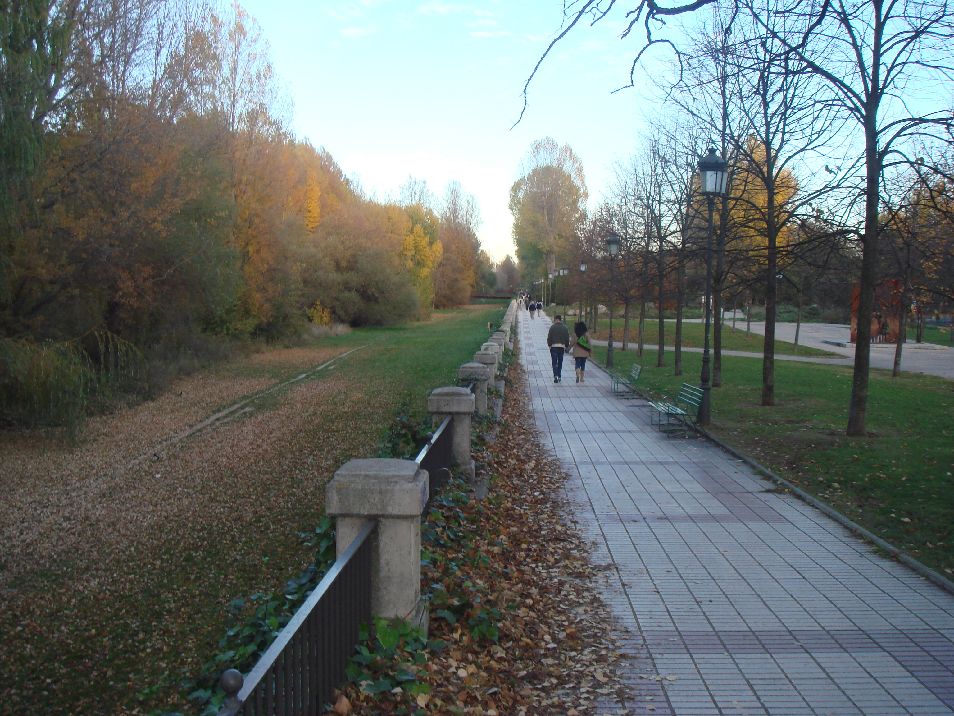 OPaseo de La Quinta, Burgos, España